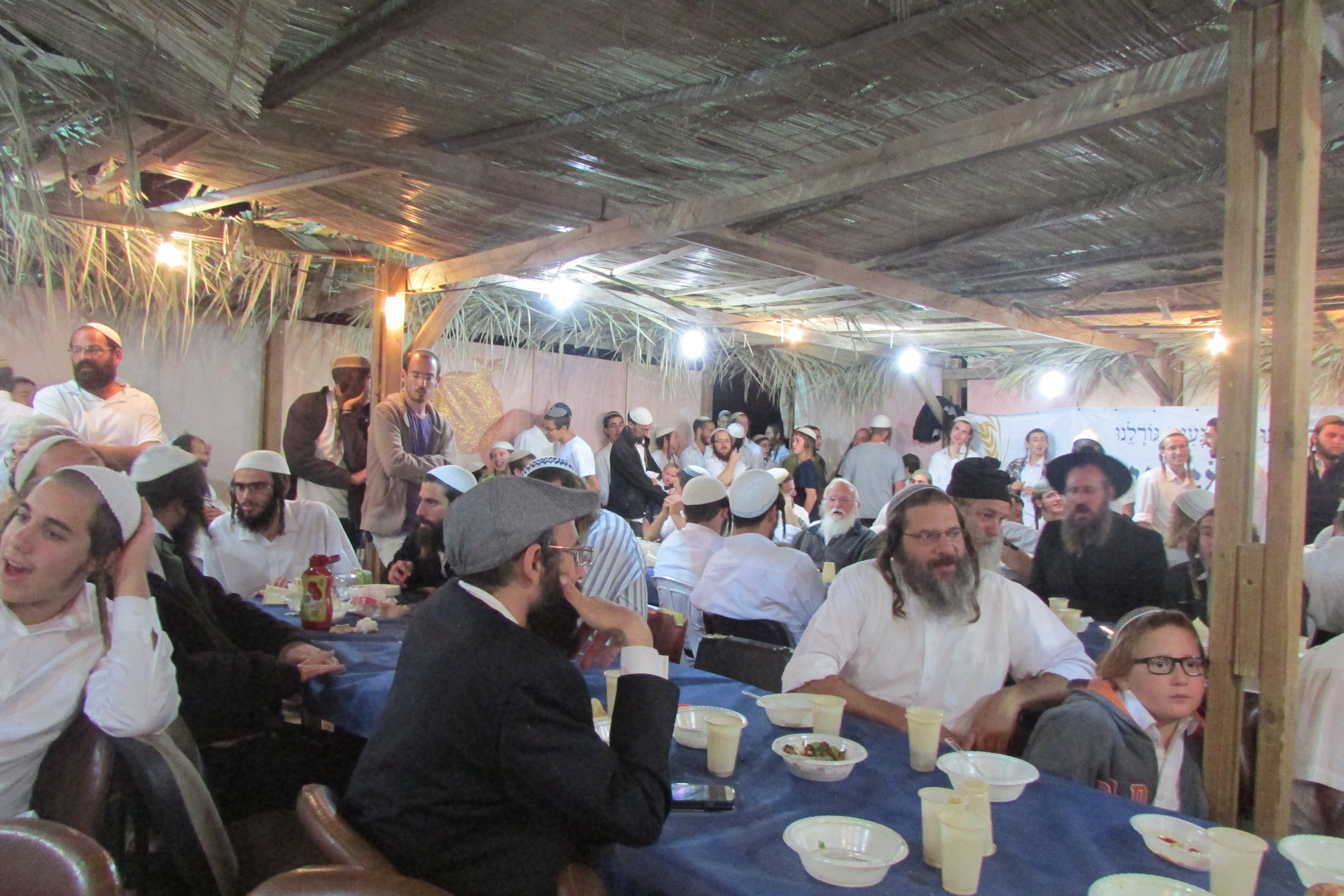 Simchat Beit HaShoeivah in Yitzhar